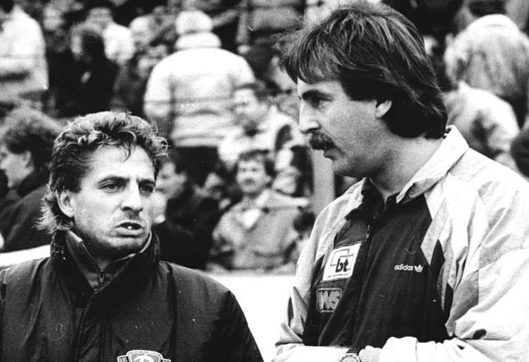 ADN- Matthias Hiekel-3.11.90 Dresden: Fußball- Oberliga Nordost- 10. Spieltag- 1. FC Dynamo Dresden - FC Hansa Rostock 0:0 Zwei "alte Bekannte" aus der Bundesliga, die es mit ihren neuen Mannschaften wieder schaffen wollen: Dresdens Trainer Peter Lux und Rostocks Coach Uwe Reinders.